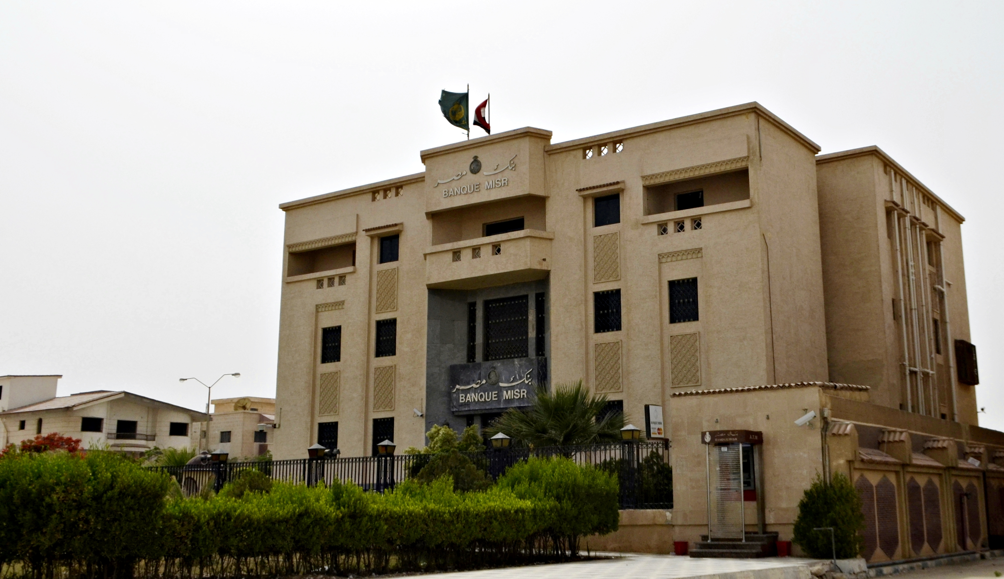 بنك مصر، فرع مدينة السادات